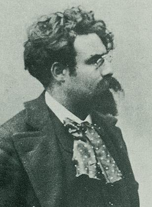 Louis Abbiate (1866-1933), monegasque composer